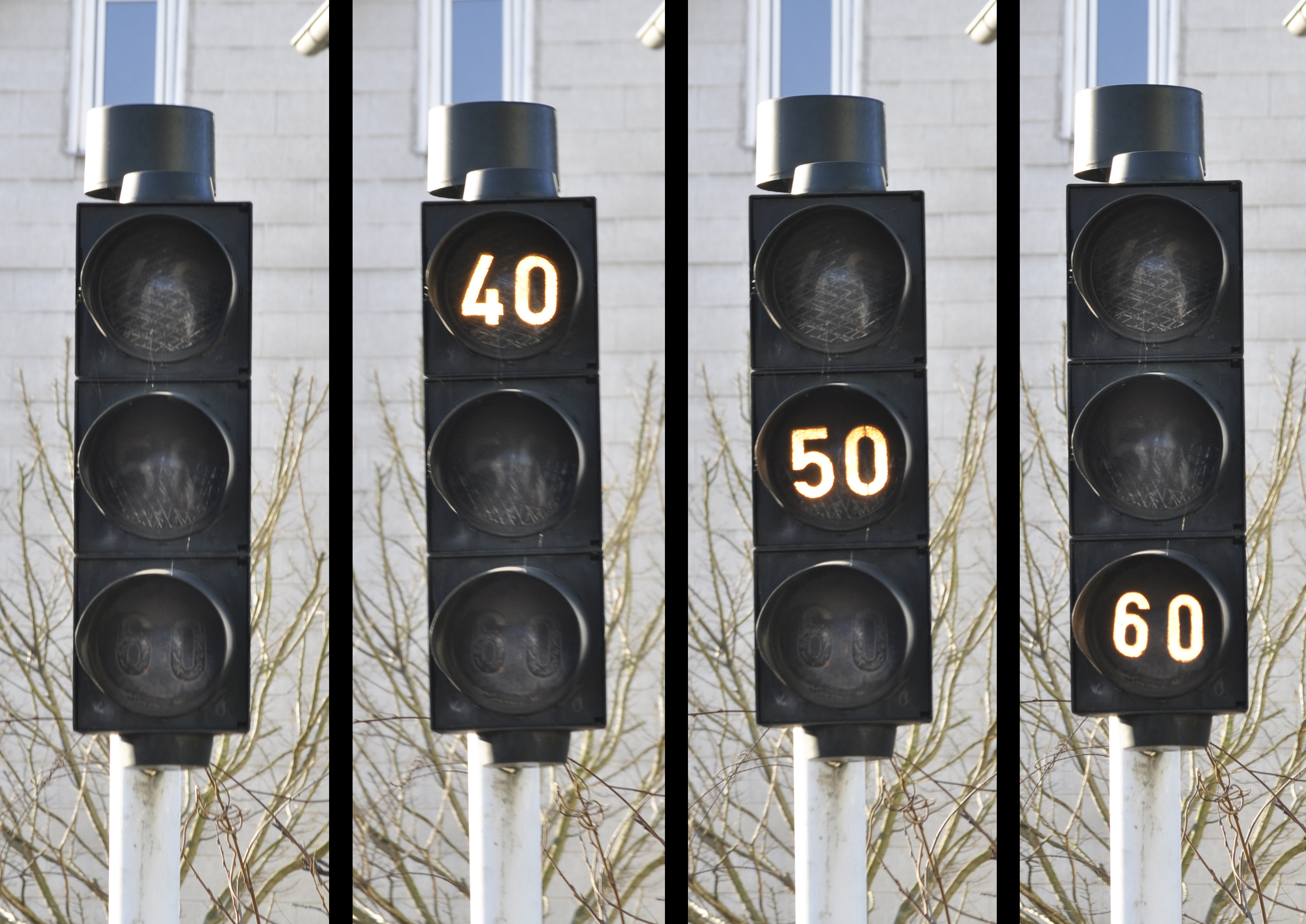 Geschwindigkeitsanzeiger, Göttingen, Kasseler Landstraße, westlich Rehbachstraße, ortsauswärts, 31.12.2013. Foto: Francisco Welter-Schultes.